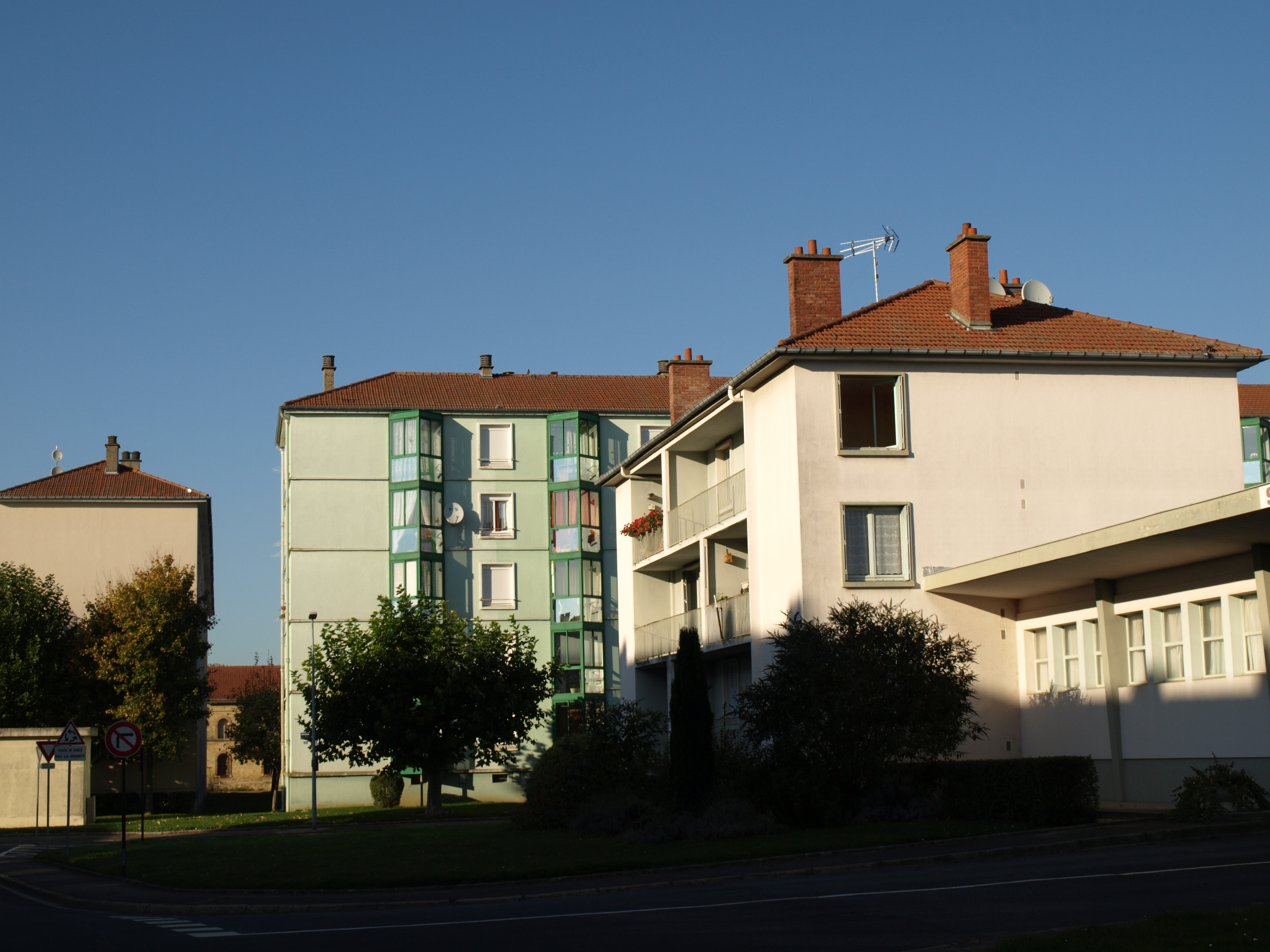 Vitry-le-François (51300 - FRANCE) : photographies Rome Saint Charles.